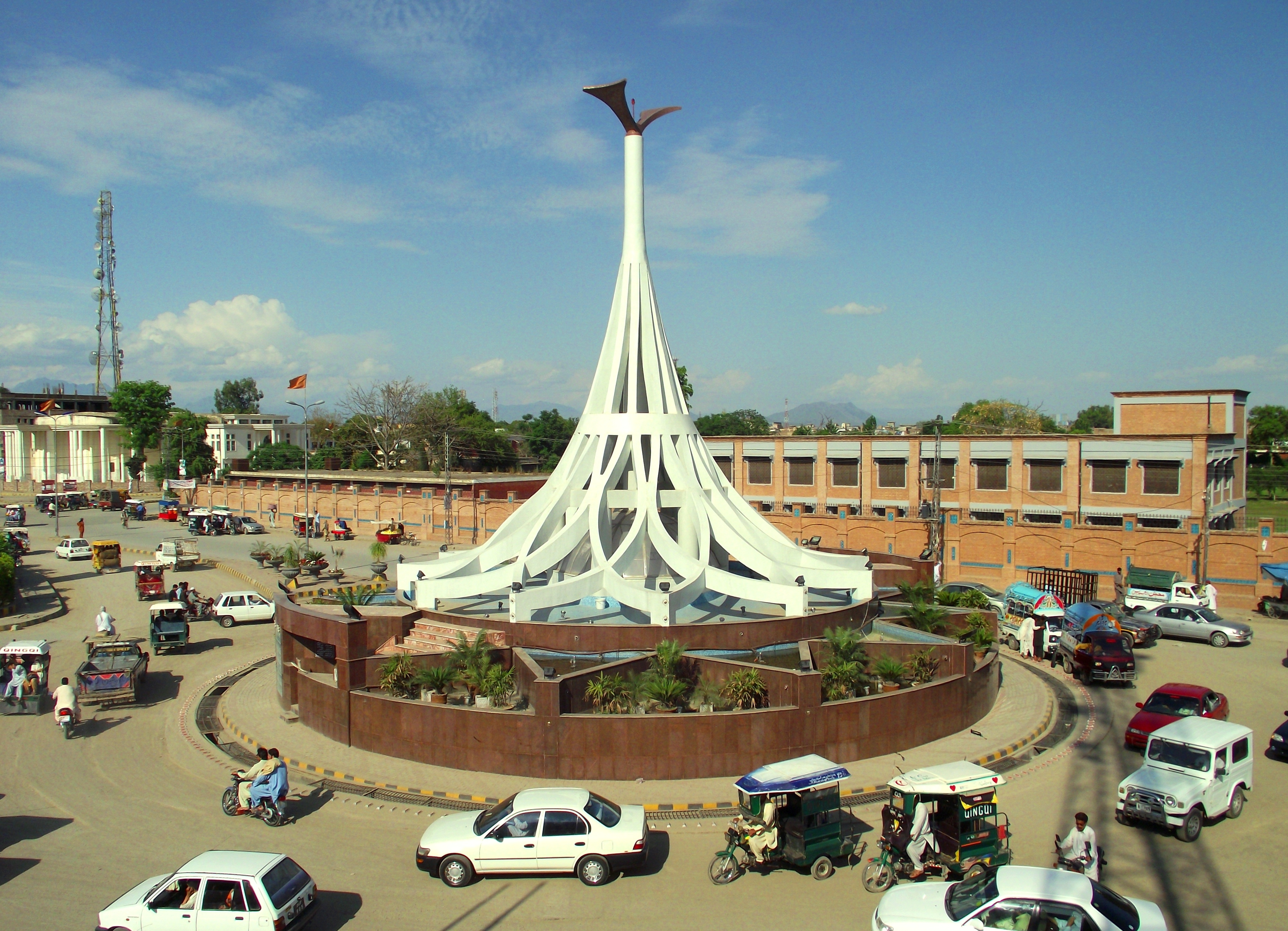 Bacha Khan Chowk, Mardan